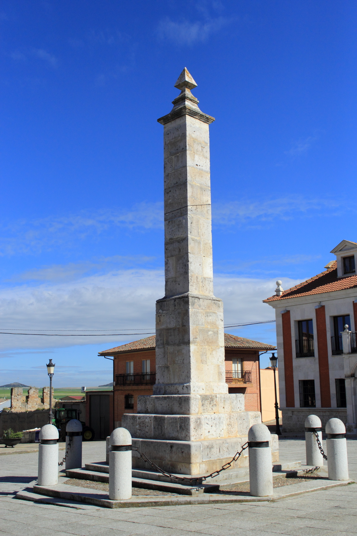 Monolito en honor a los jefes comuneros. Villalar de los Comuneros, provincia de Valladolid, Castilla y León, España